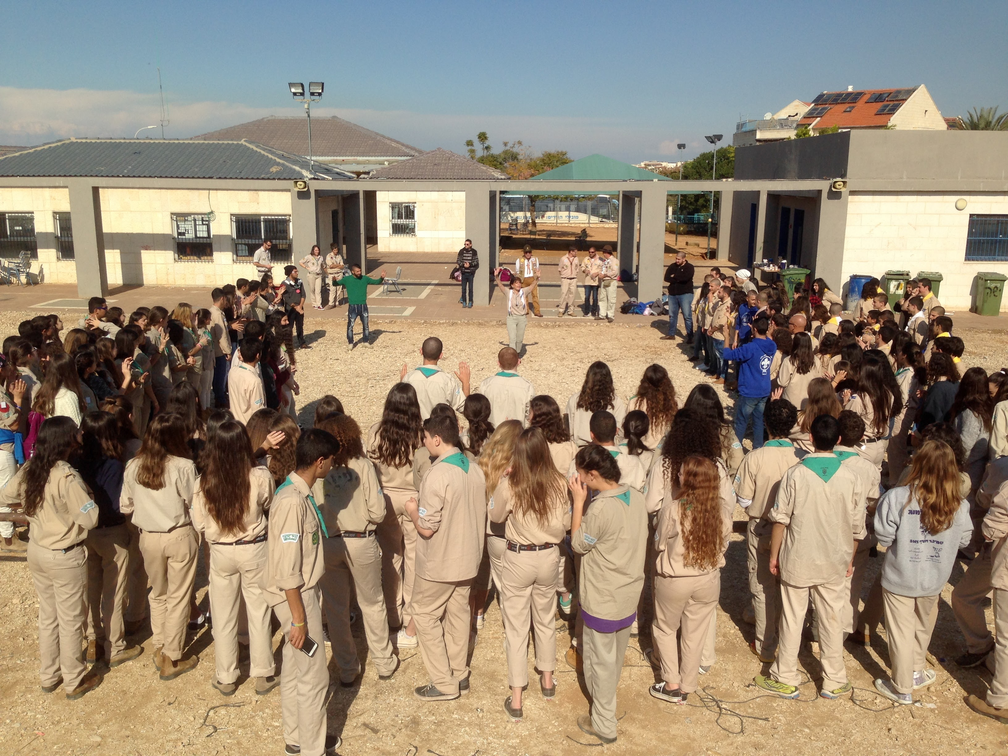 מעגל קיום בצוותא - התאחדות הצופים והצופות בישראל